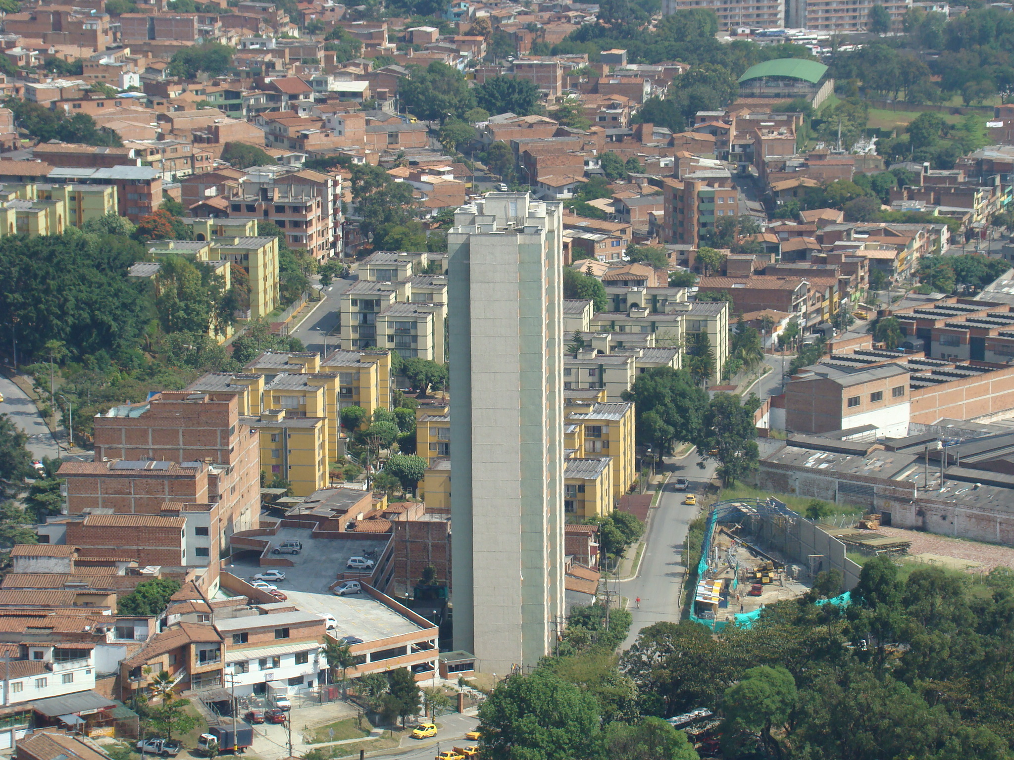 Edificios en Medellín, Colombia